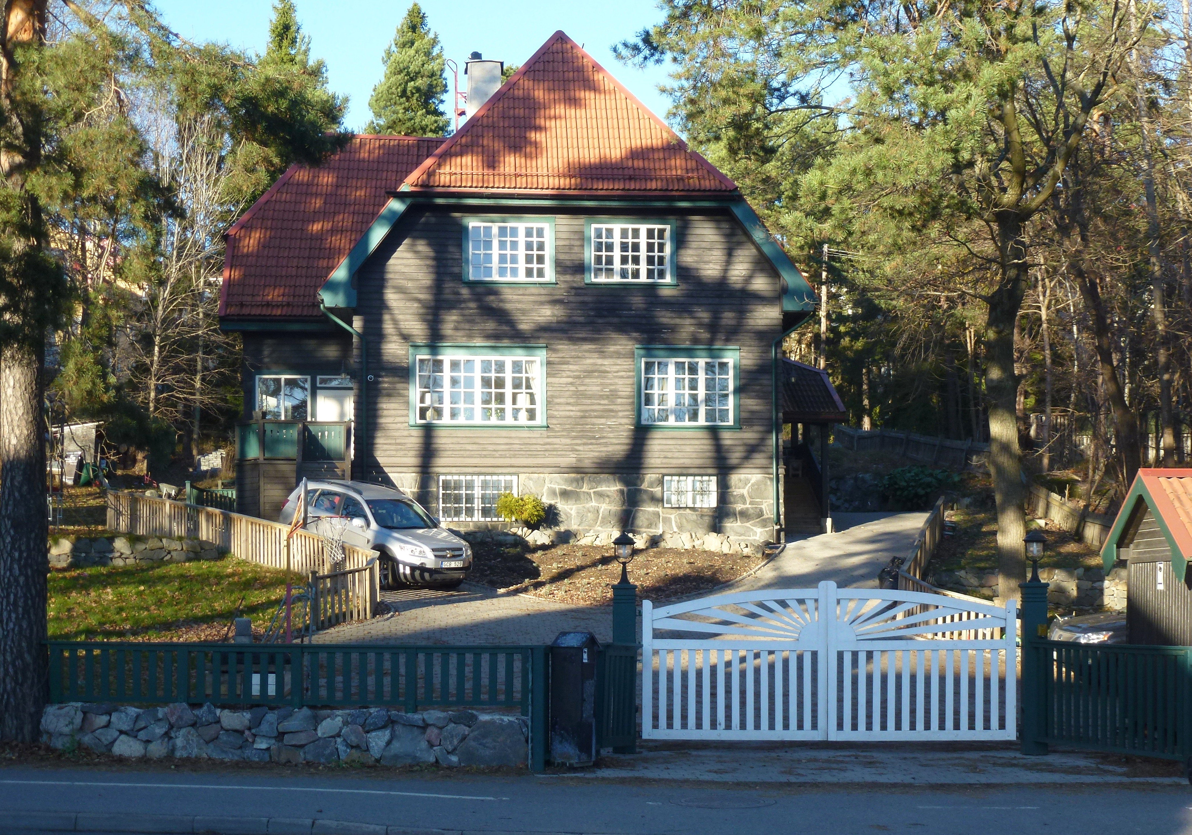 Villa Hallström, Värmdövägen 199, arkitekt Albin Brag